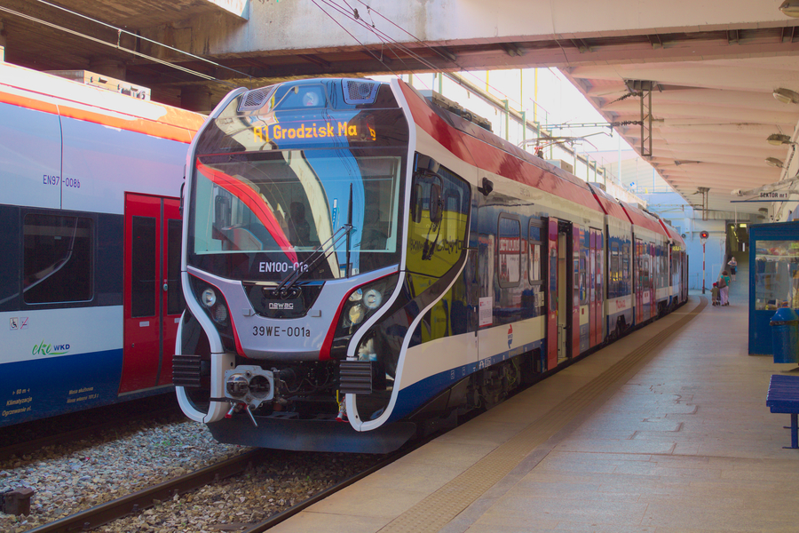 Elektryczny zespół trakcyjny EN100-01 stoi na stacji Warszawa Śródmieście WKD.